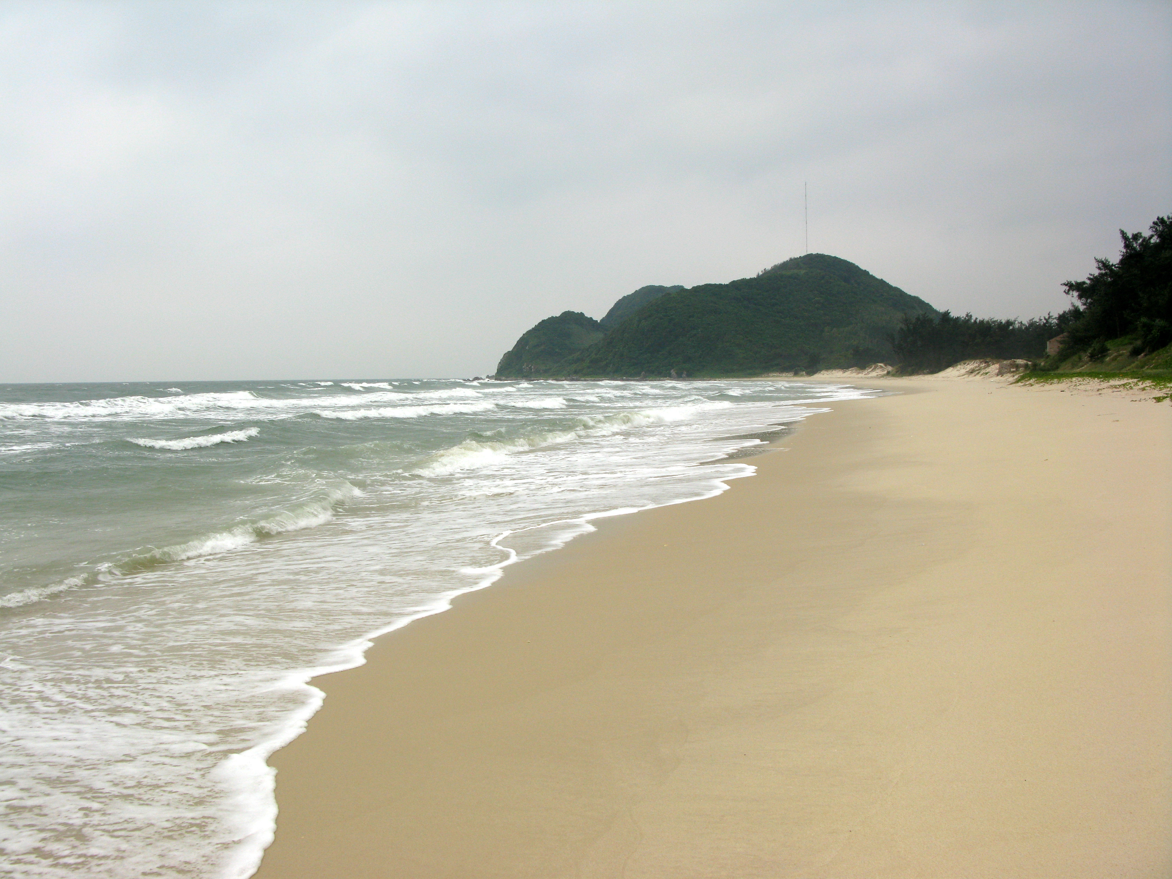 Bãi biển Sơn Hào (xã Quan Lạn), đảo Cao Lôn, quần đảo Vân Đồn, Việt Nam